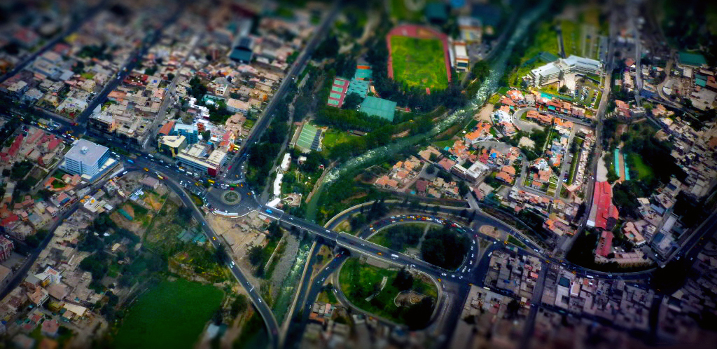 Arequipa desde el aire